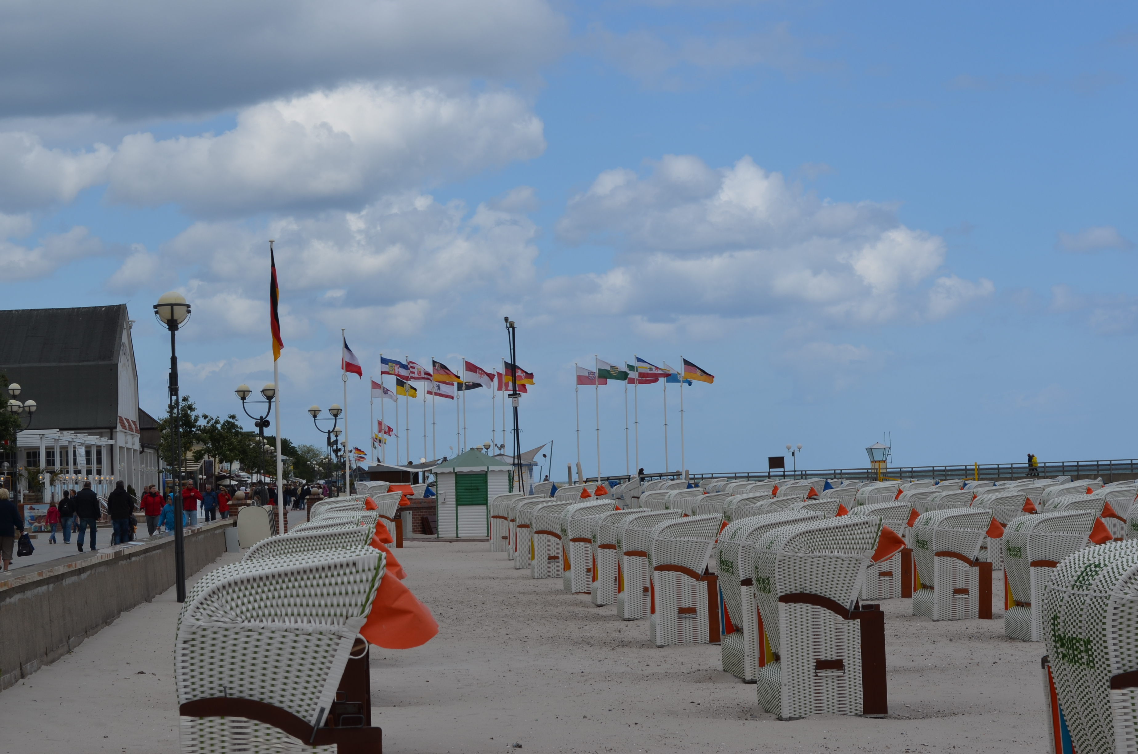 Grömitz, Blick über den Strand zur Seebrücke 7